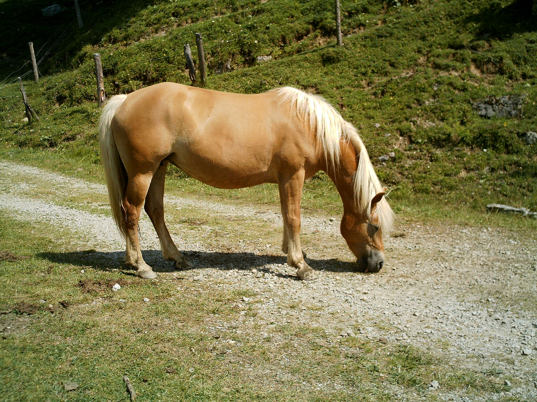 Ein Haflinger in Ramsau/Dachstein (Österreich)